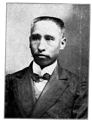 中華民國國會議員